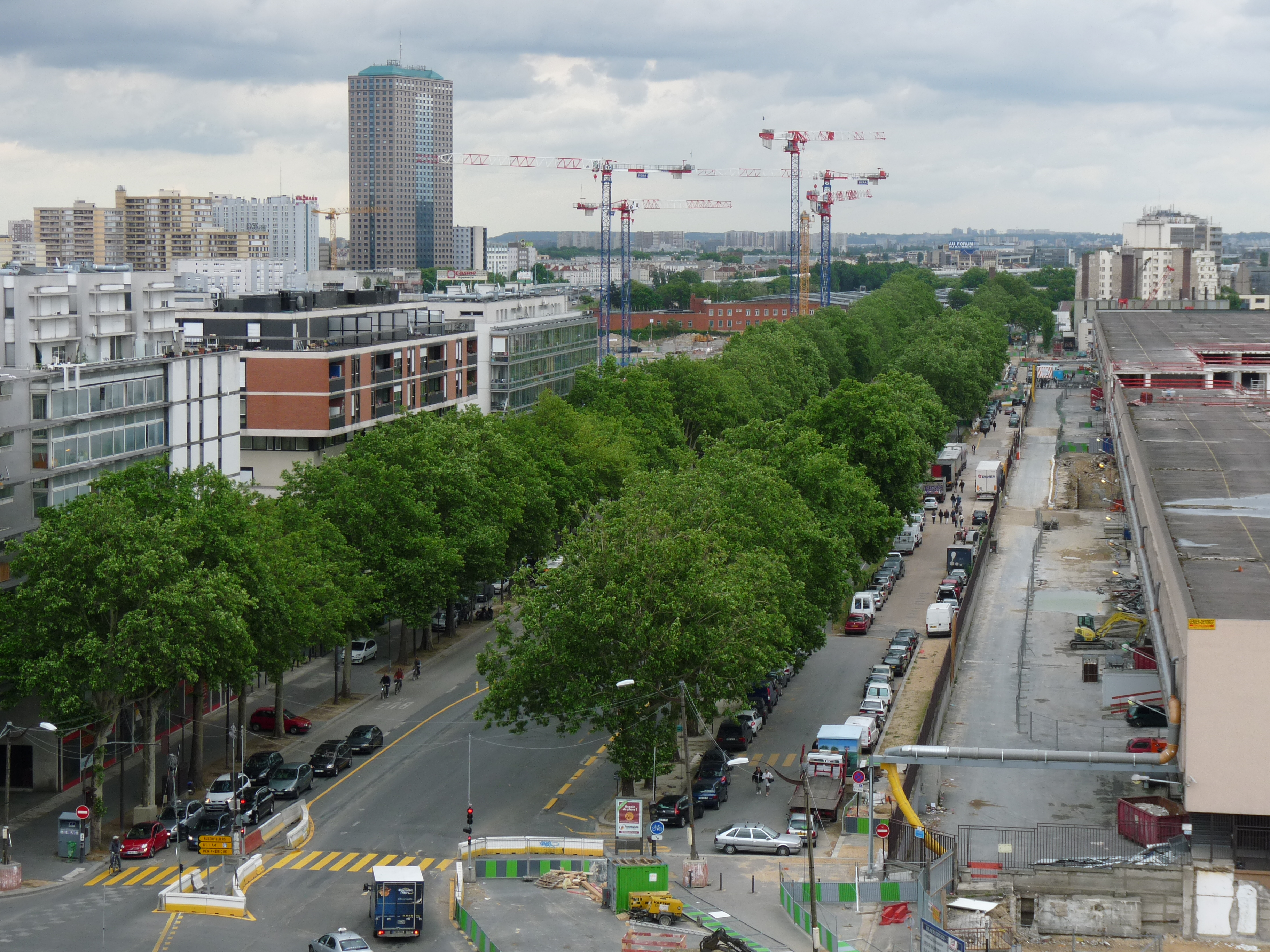 Le boulevard Macdonald à Paris, avec les entrepots sur la droite. Photo prise du toit du bâtiment à l'angle du boulevard Ney avec la rue d'Aubervillers.